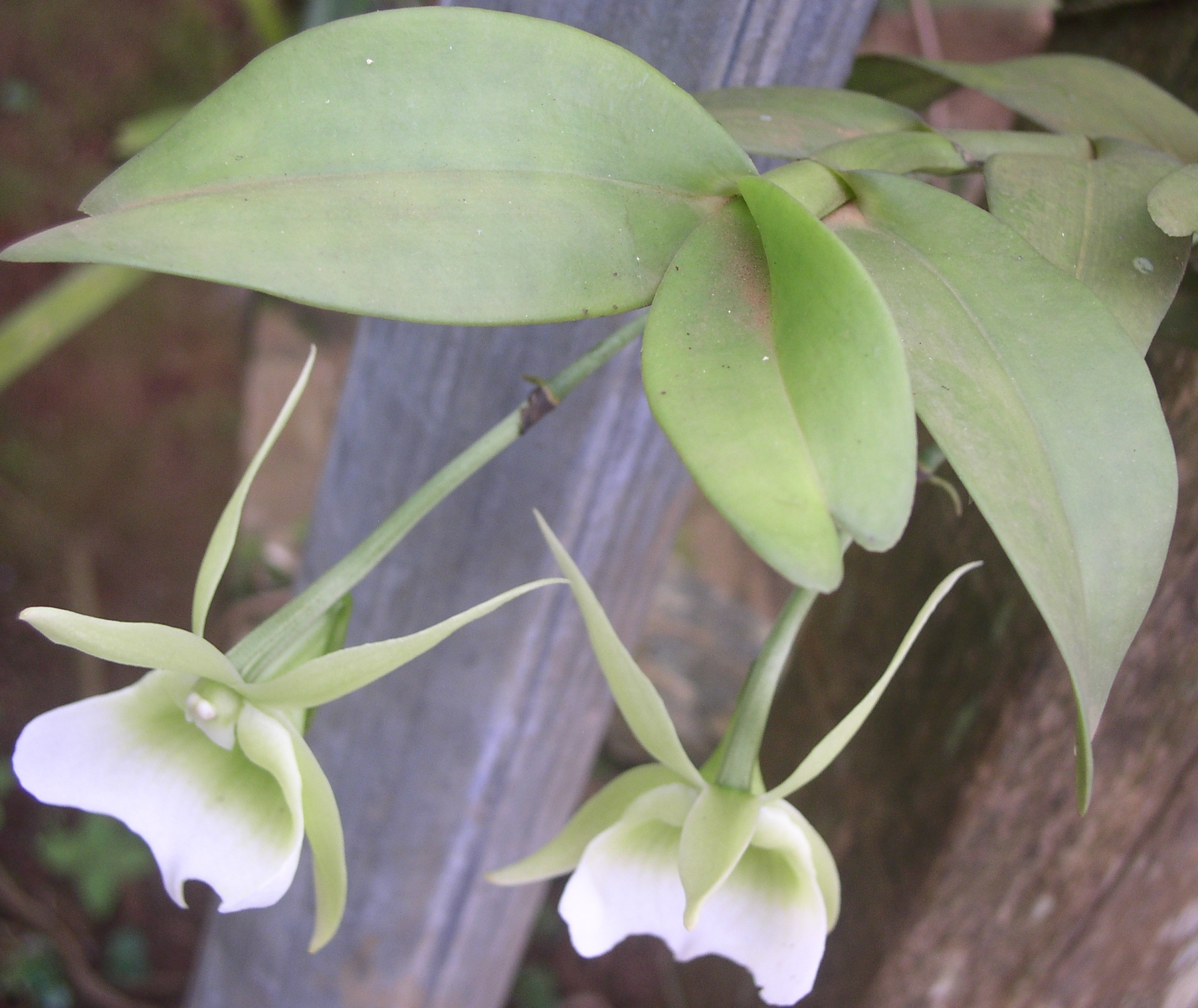 Herbe rampante sur les rochers ou sur les racines des arbres formant parfois une masse dense.